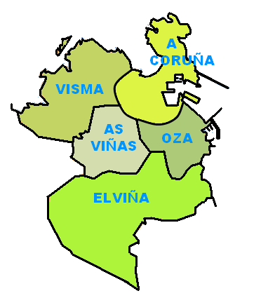 parroquias coruña